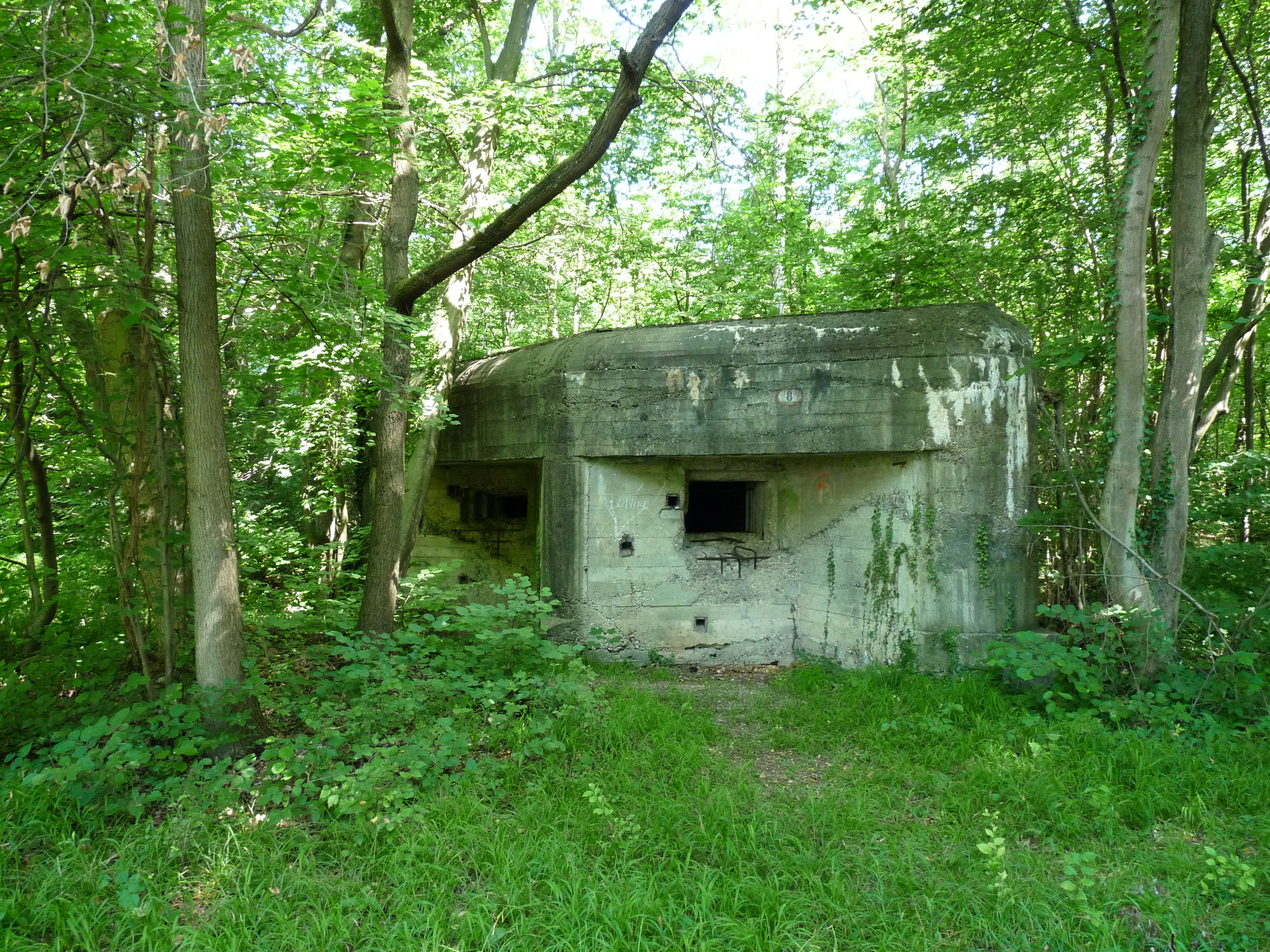 Sur la "Piste des Forts", dans la forêt de la Robertsau, au nord de Strasbourg